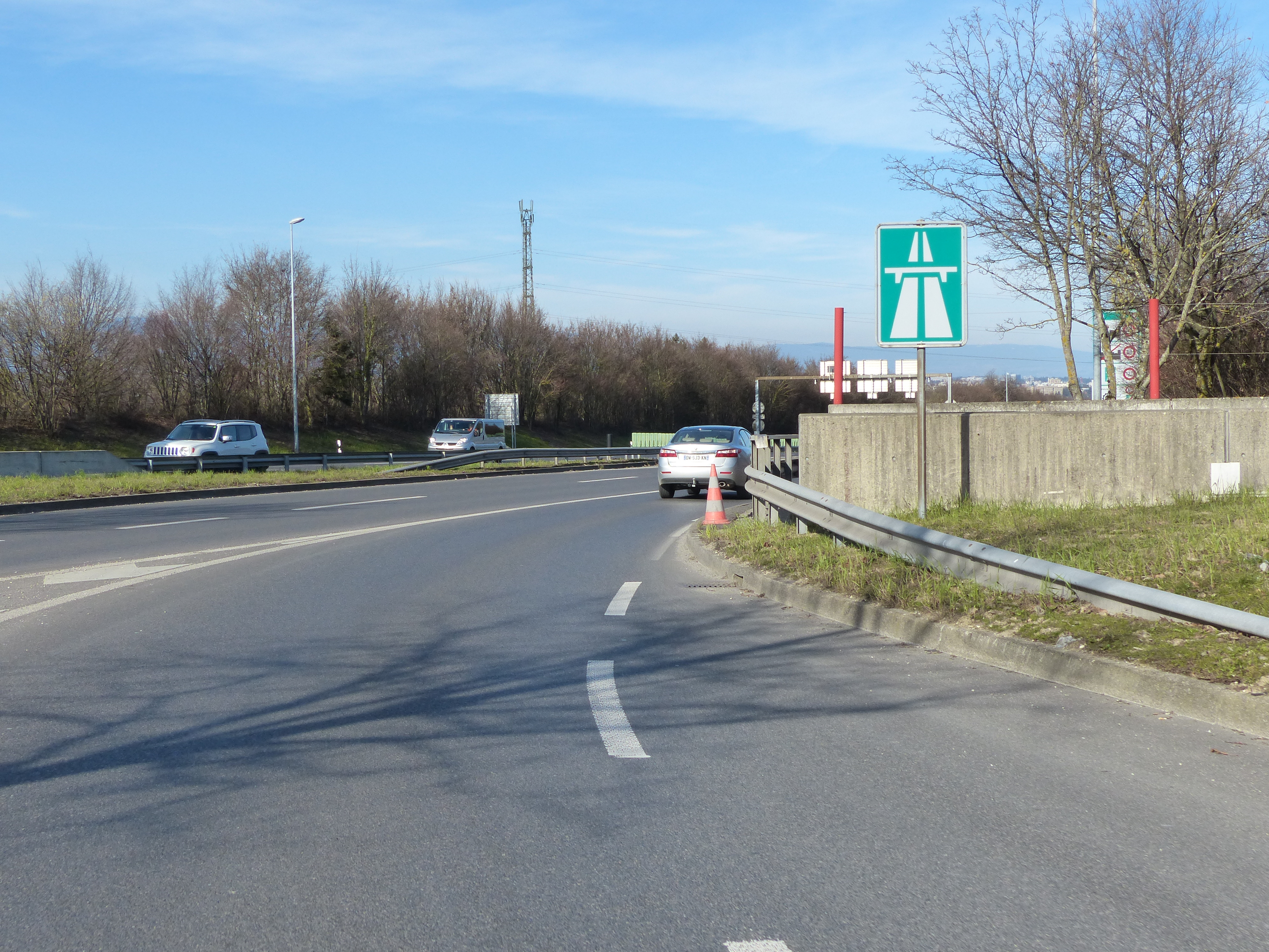 Panneau 4.01 au début de l'autoroute suisse A1, Bardonnex, canton de Genève, Suisse.